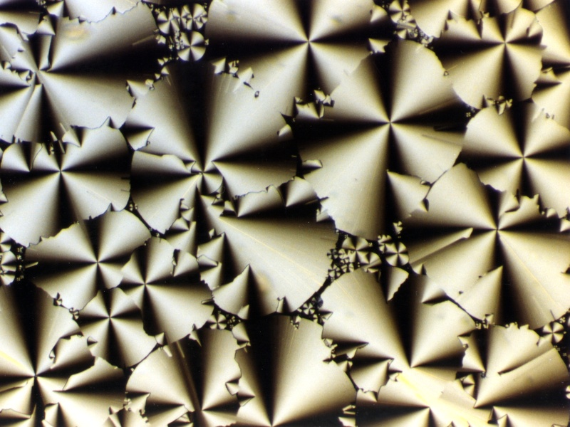 Polarisationsmikroskopische Aufnahme einer rechtwinklige kolumnare Phase von bent-core („bananenförmigen“) Mesogenen; Textur aus zirkularen Domänen (Spheruliten).